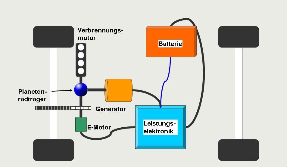 Systemstruktur eines leistungsverzweigenden Hybridantriebs